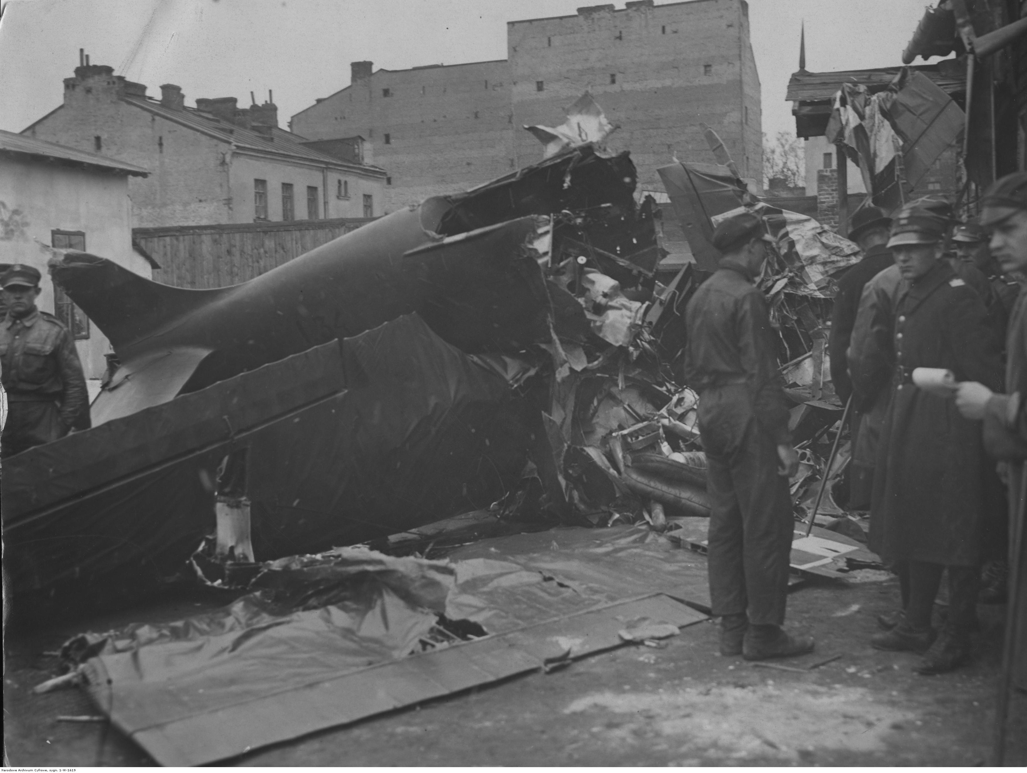 Katastrofa lotnicza w Warszawie. Rozbity samolot Bleriot SPAD I 23 płk. Zdzisława Zycha-Płodowskiego. Koncern Ilustrowany Kurier Codzienny - Archiwum Ilustracji. Sygnatura: 1-W-1619